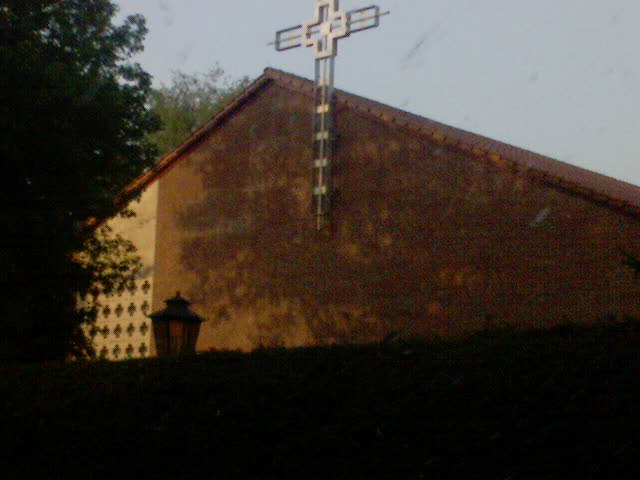 Corpus-Christi-Kirche Rotenburg (Wümme)